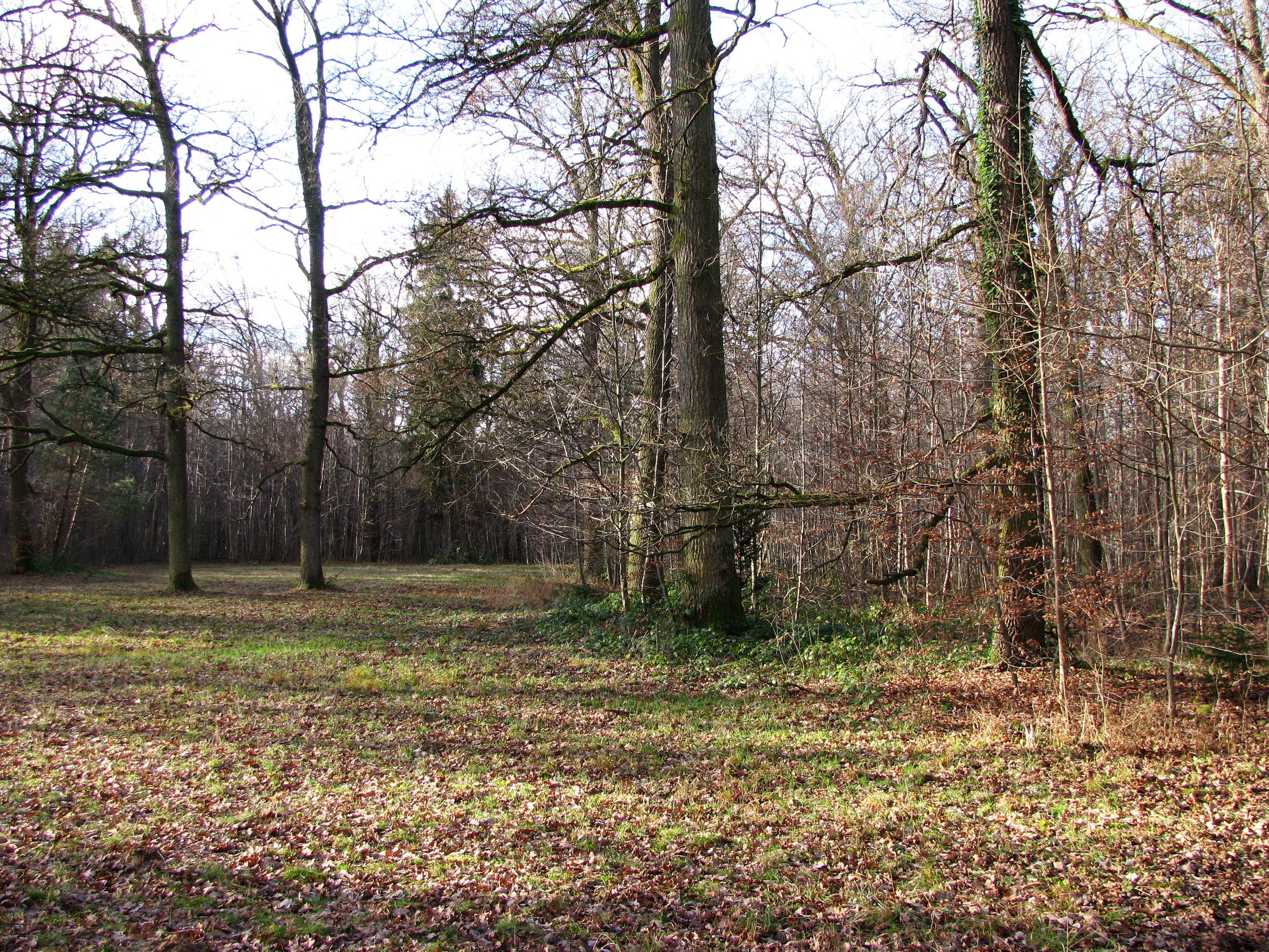 Kapuzinerhölzl im Dezember